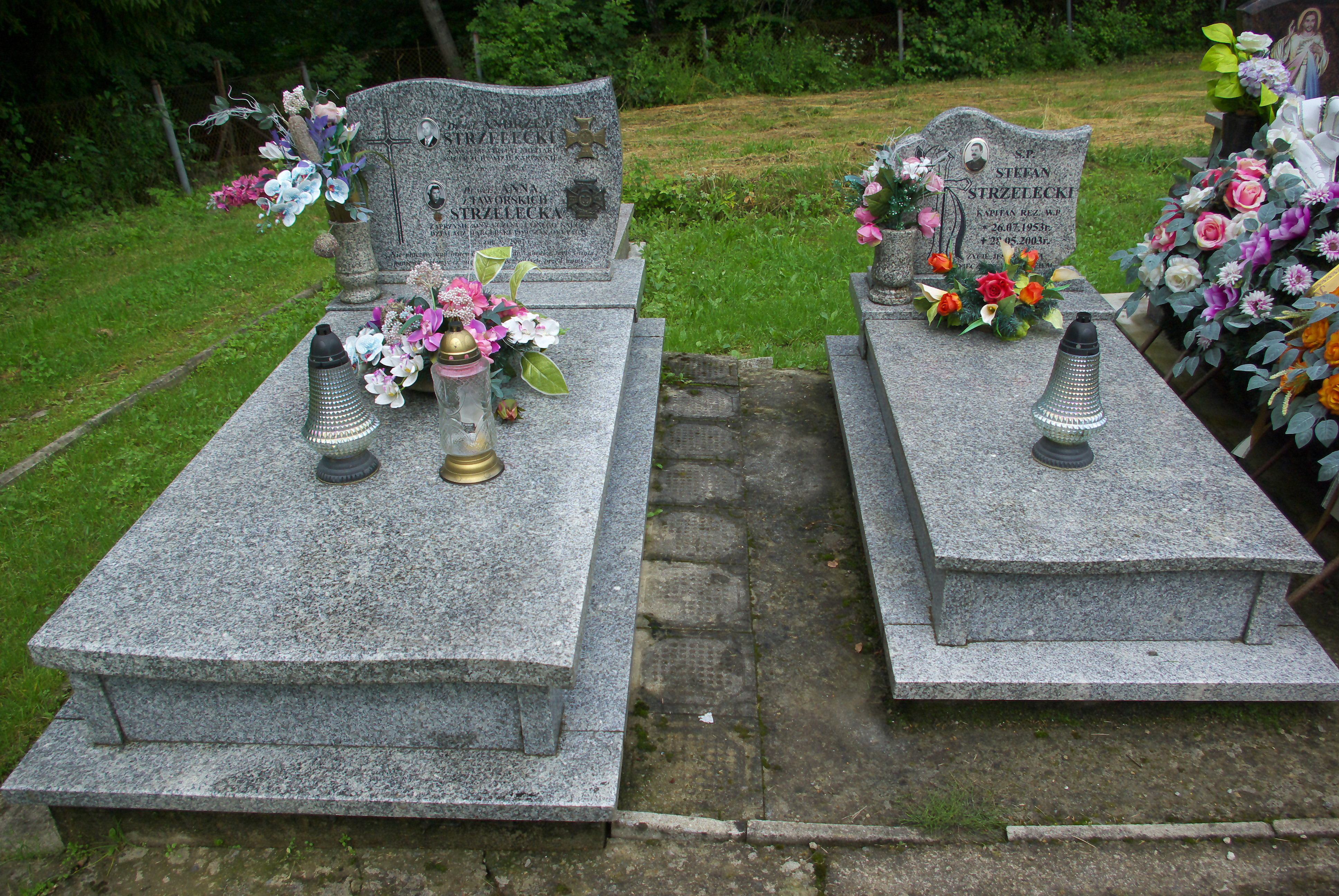 Nagrobek Andrzeja i Anny Strzeleckich na cmentarzu w Lisznej (2020).